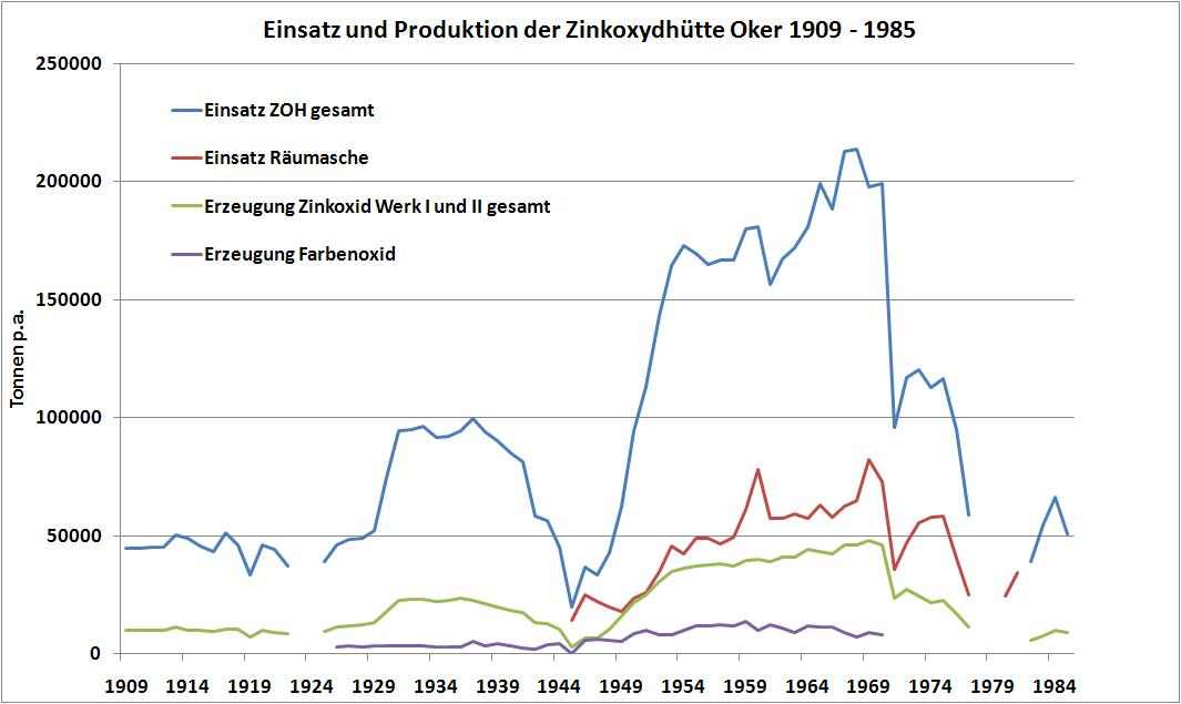 Entwicklung des Einsatzes und der Erzeugung der Zinkoxydhütte Oker 1909 bis 1985